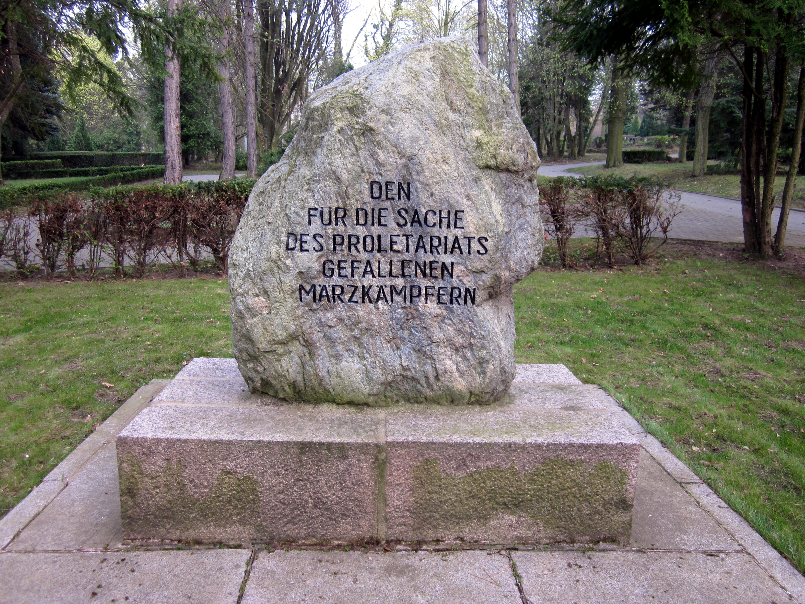 Friedhof Weißenfels: Gedenkstein für die Märzgefallenen